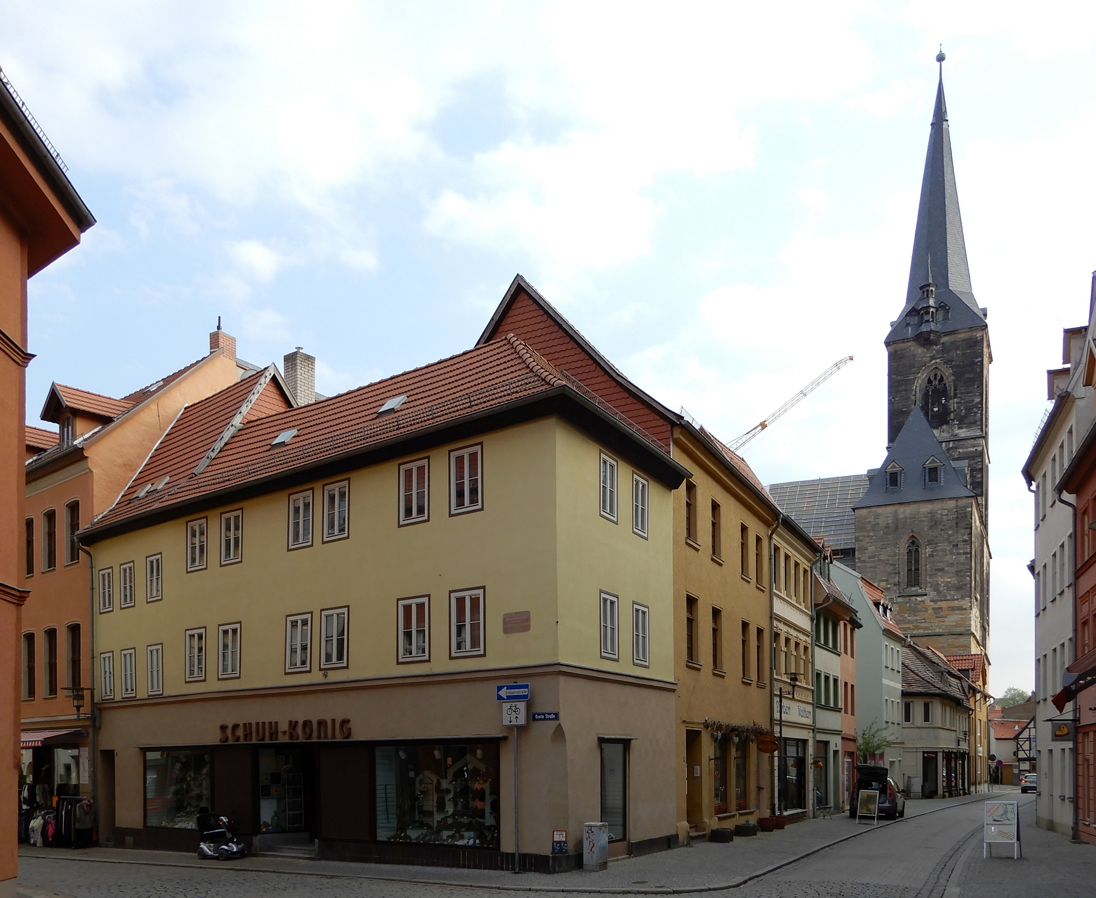 Gebäude Breite Straße 1 Ecke Hinter dem Turm 33-31 in Aschersleben